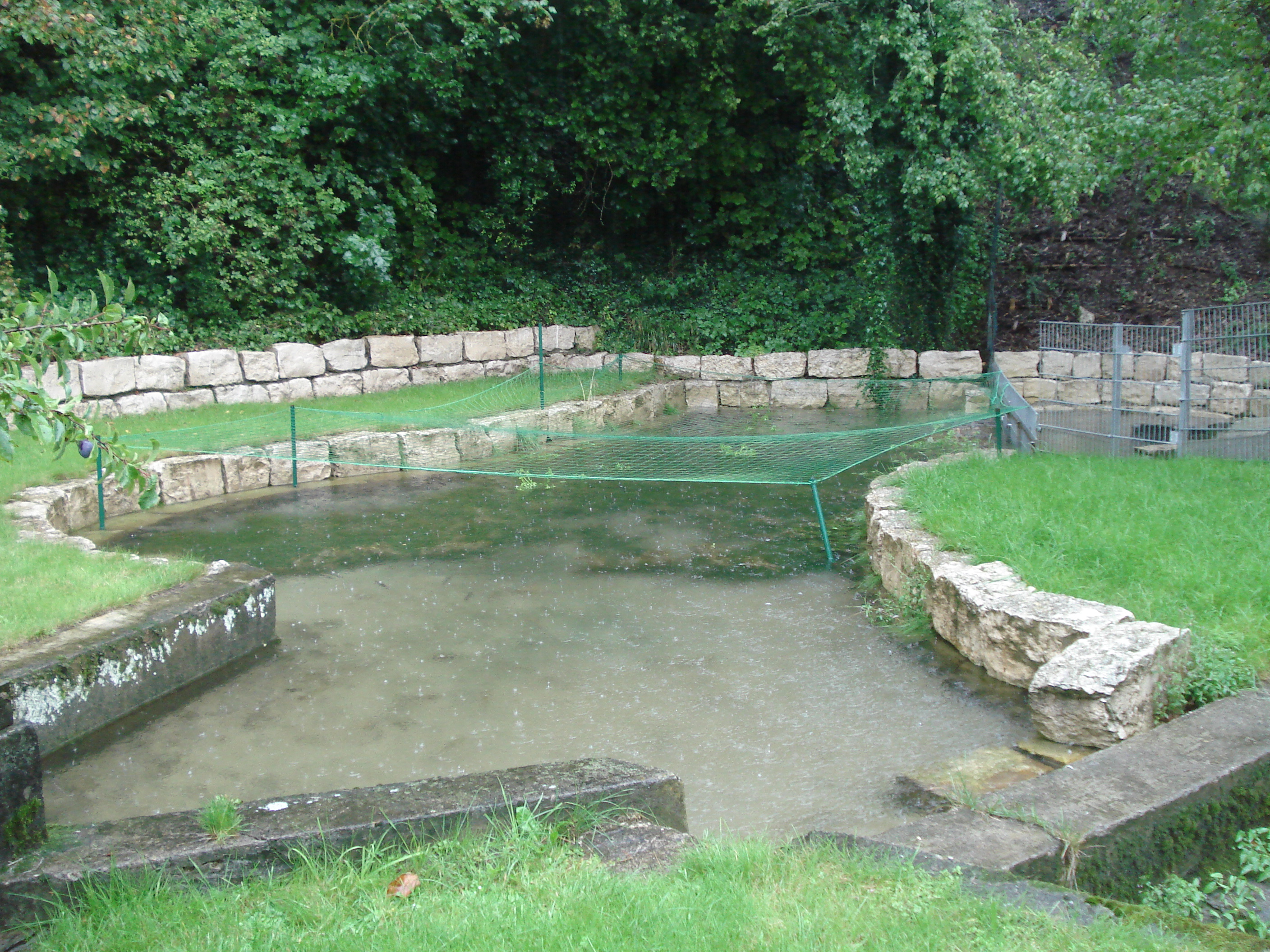 Die Karstquelle in Gundlfing